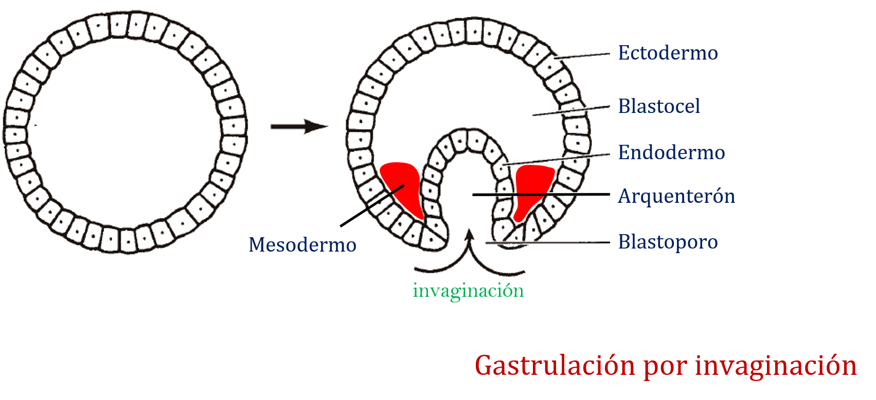 Invaginación